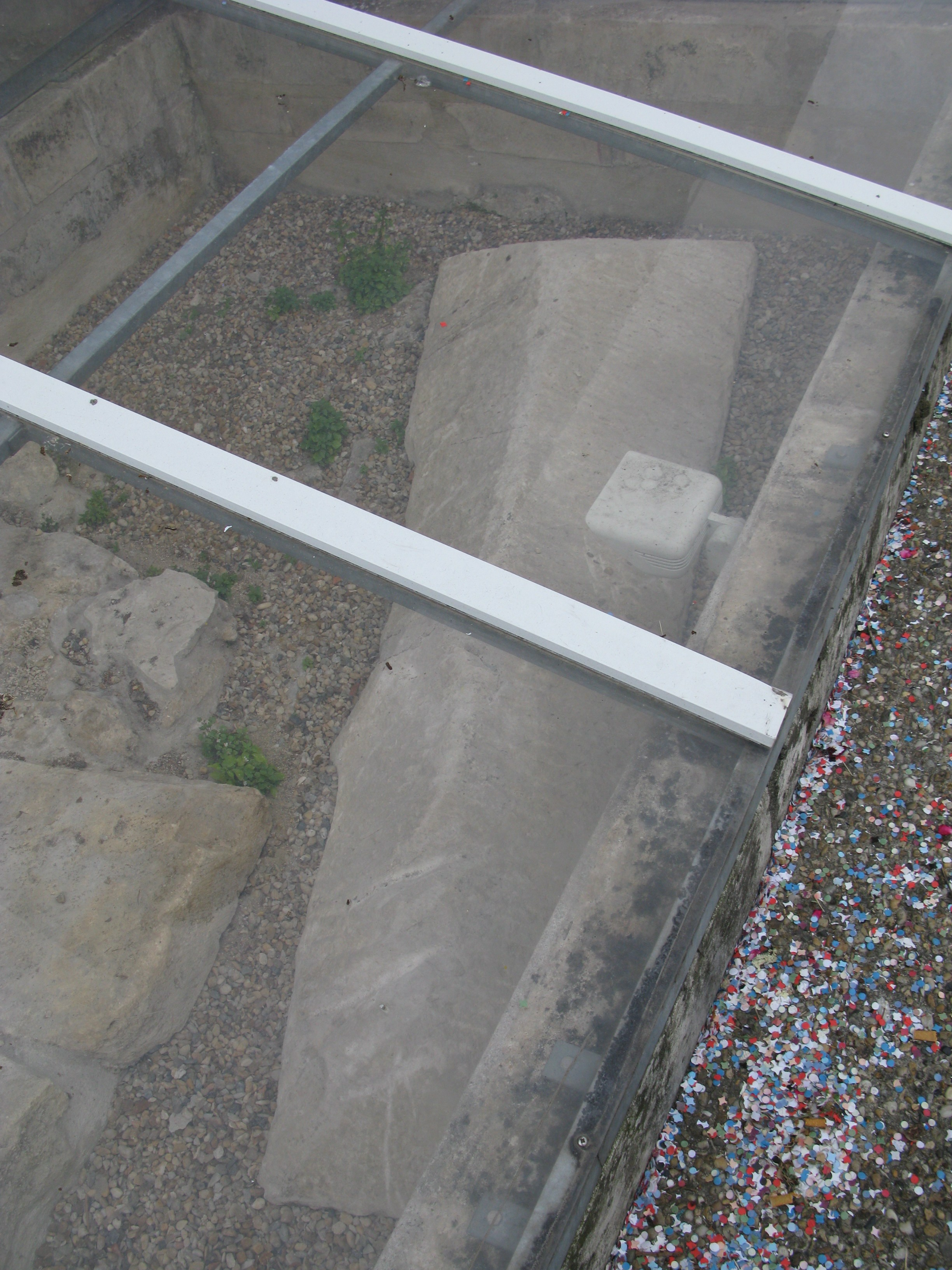 Sarcophages trapezoïdaux du haut-moyen âge, devant l'église Saint-Étienne de Tonnay-Charente.